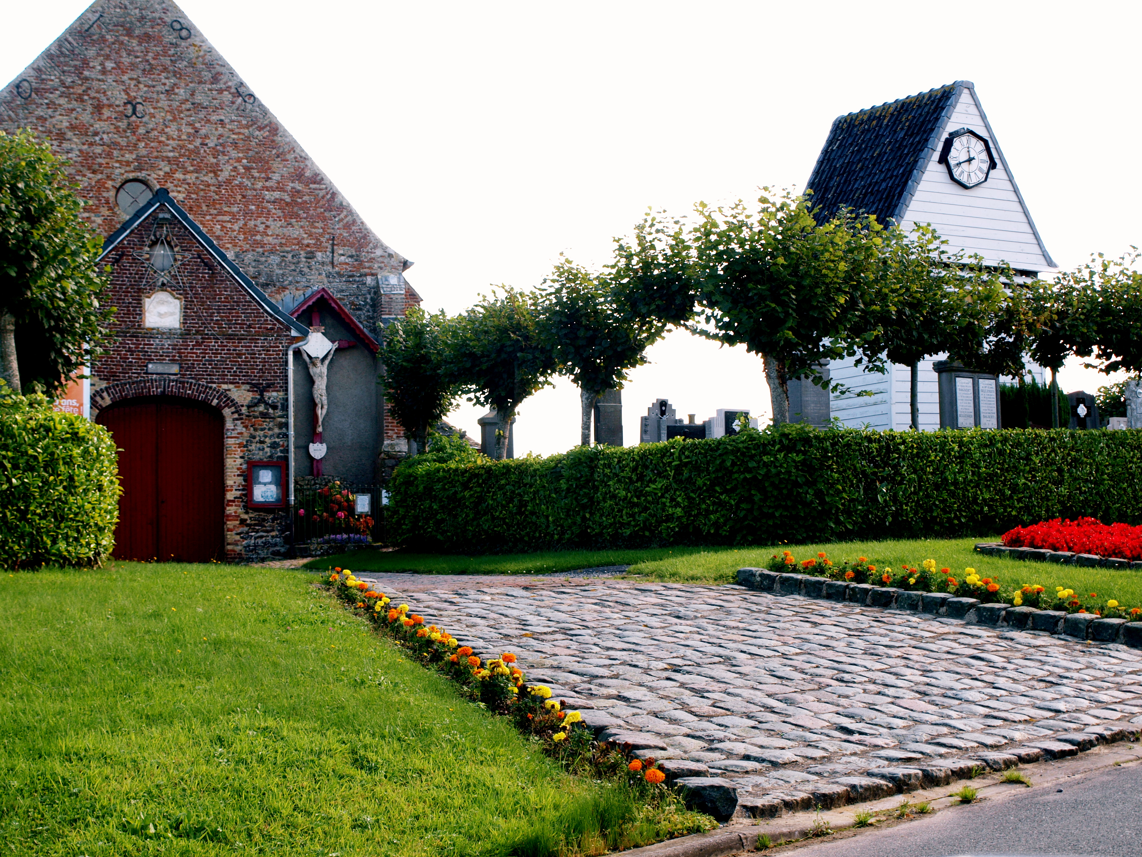 Eglise